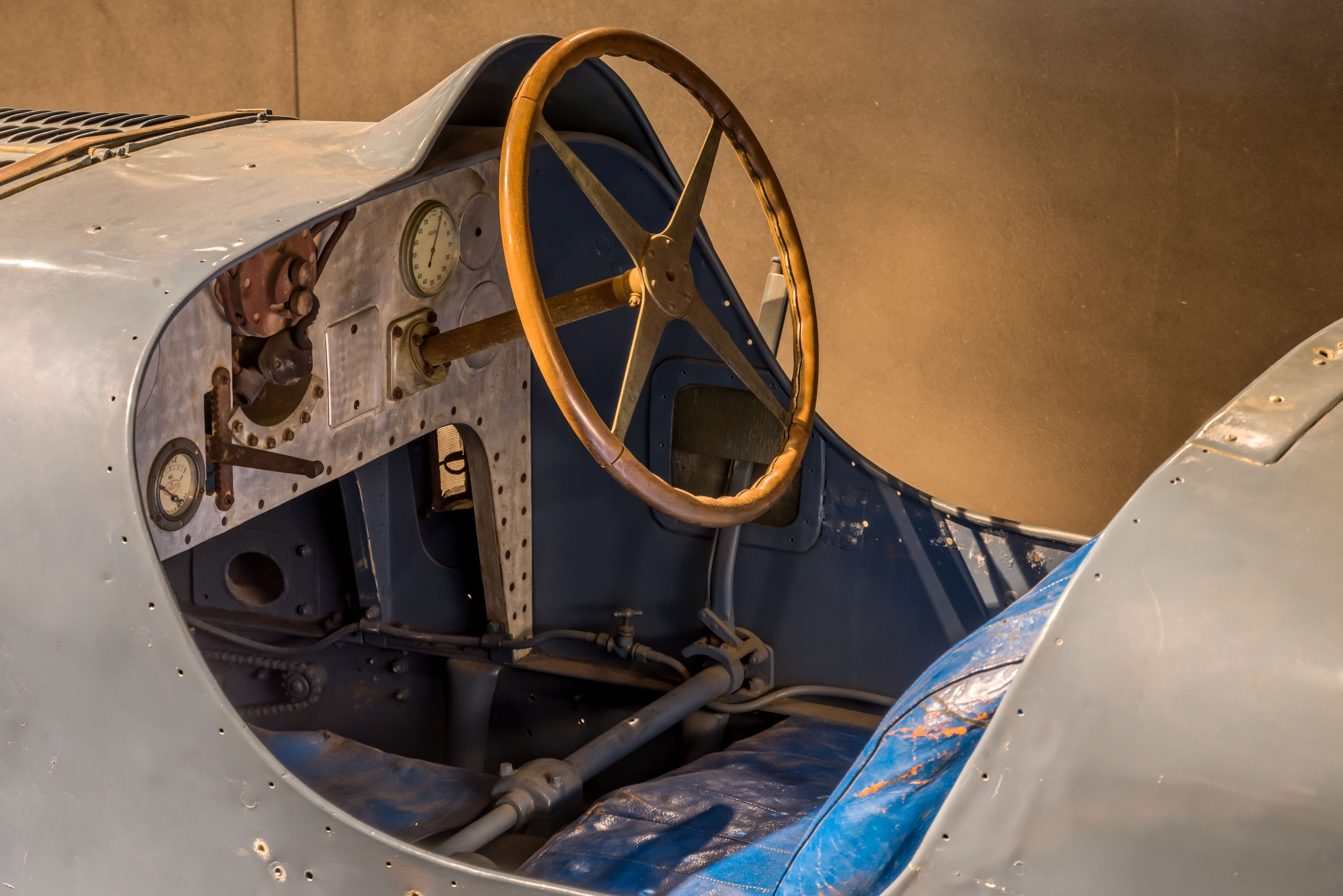 Das Volante Oldtimermuseum in Kirchzarten